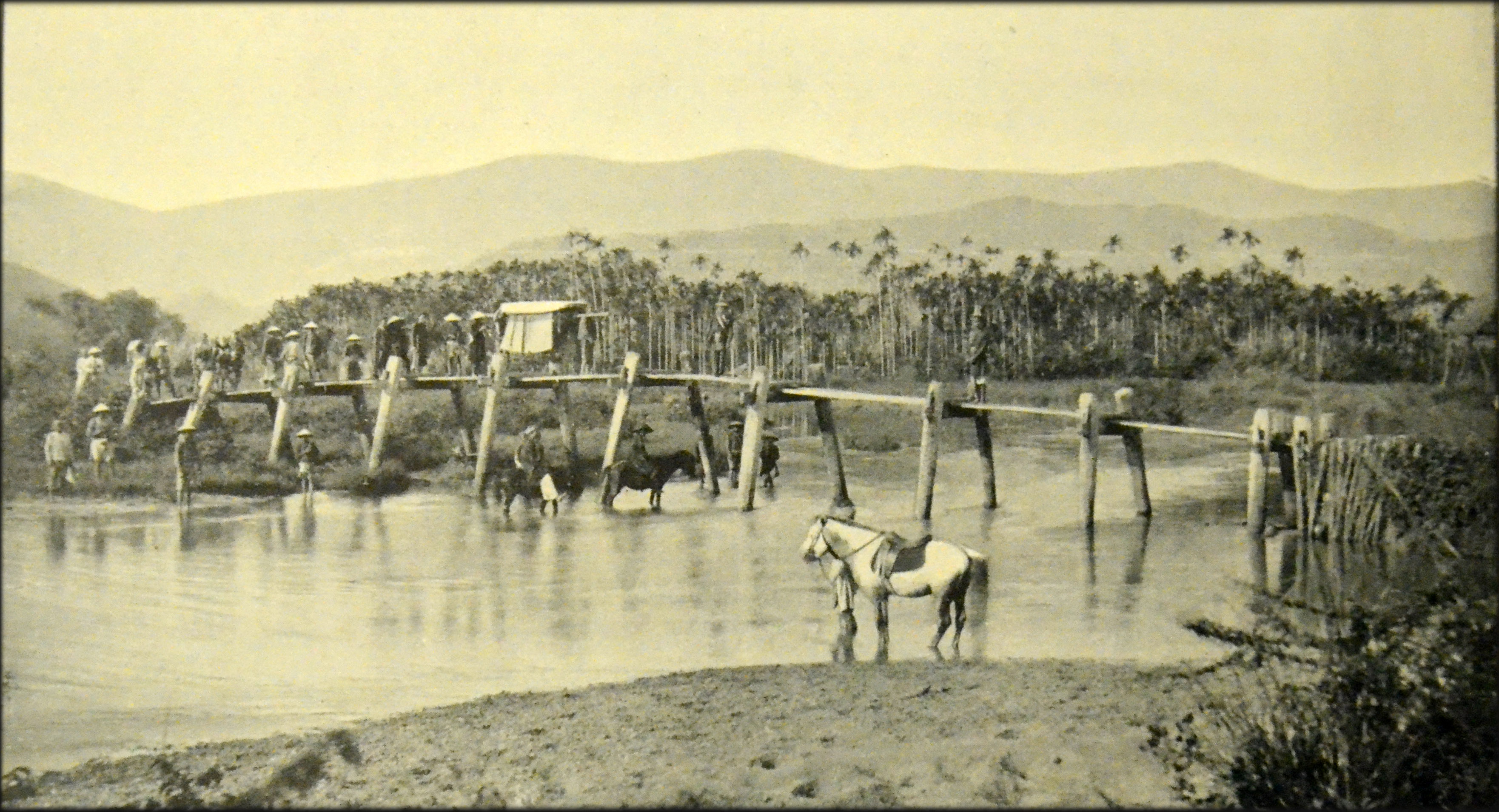 mandarin traversant un pont près de Nha-Trang, au Tonkin. Photo extraite d'une revue française nommée "Revue illustrée", (tome relié de 1902)